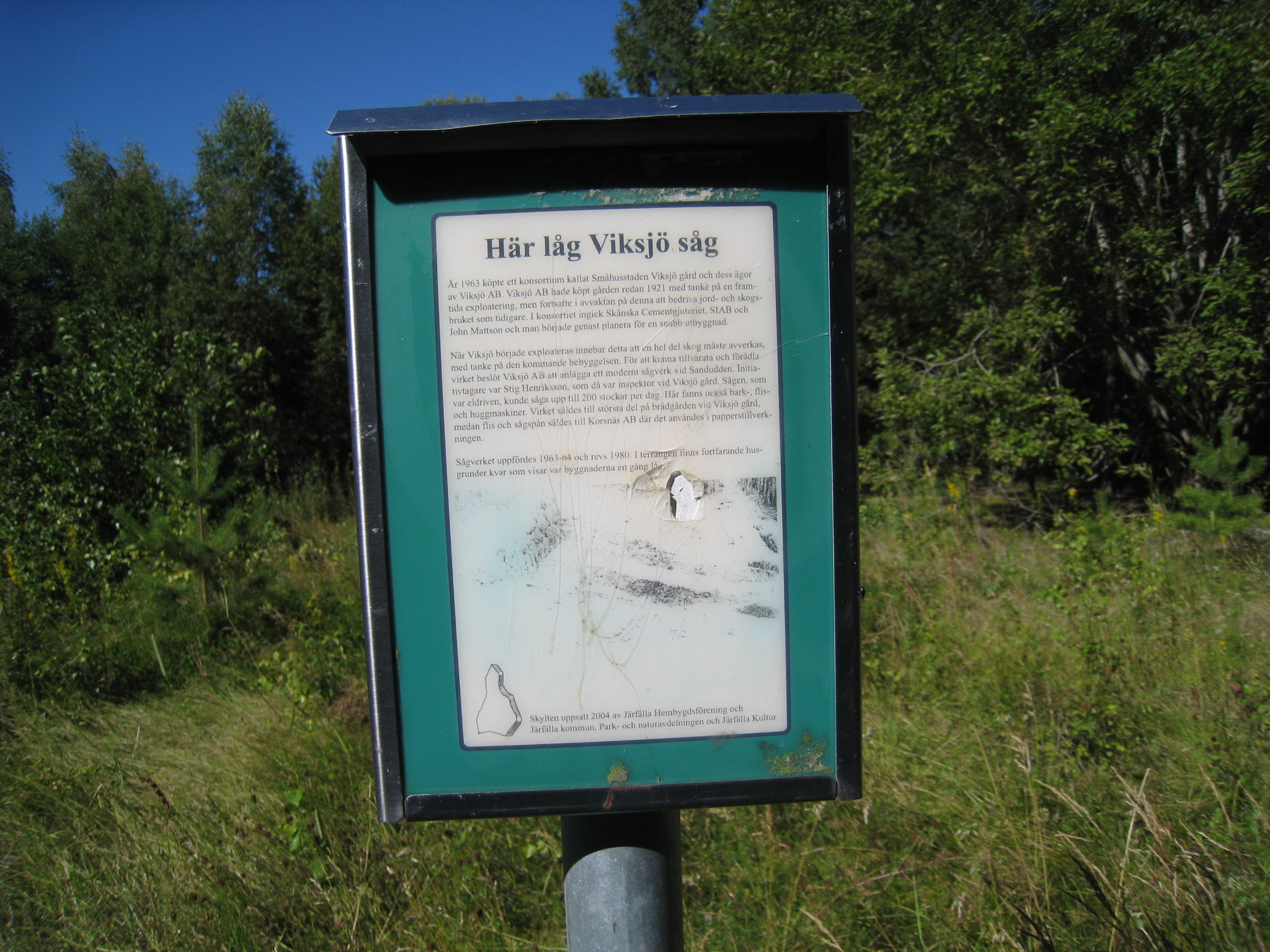 Skylten visar platsen "Här låg Viksjö såg" åren 1963-1980 i Sandvik, Viksjö, Järfälla kommun. Skylten uppsatt 2004 av Järfälla Hembygdsförening och Järfälla kommun, park- och naturavdelningen samt Järfälla Kultur.